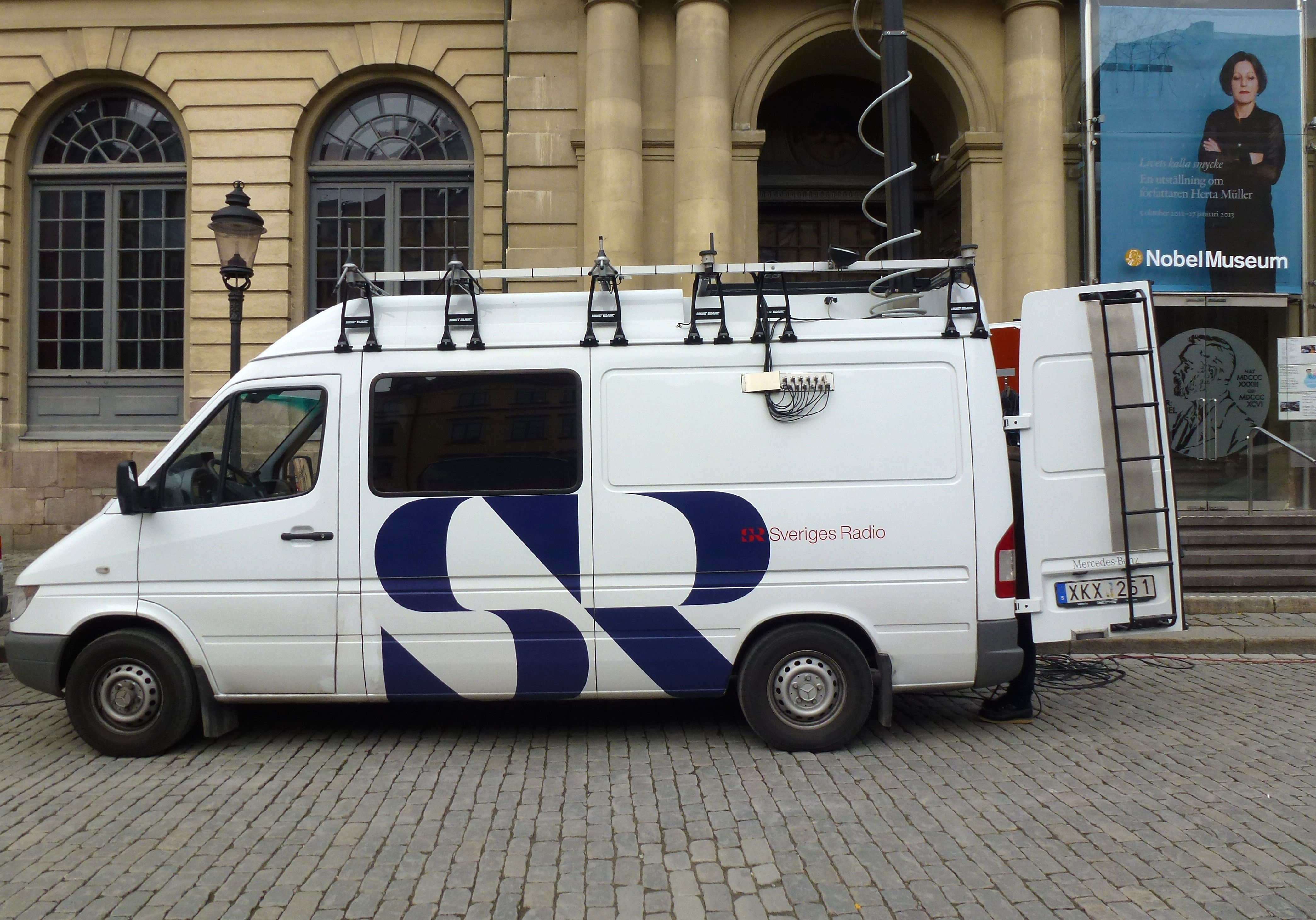 Sveriges Radio utanför Nobelmuseum 11 okt 2012